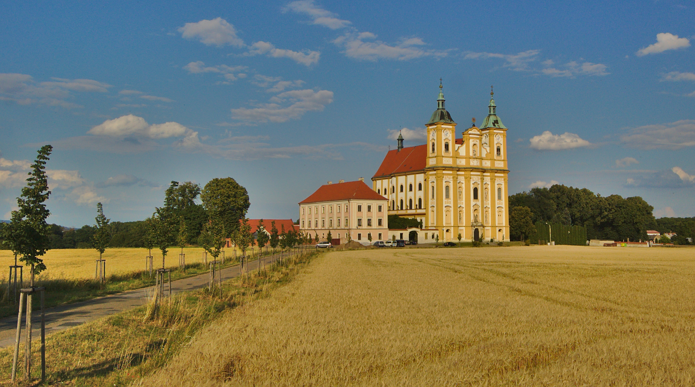 Kostel Očišťování Panny Marie, Dub nad Moravou, okres Olomouc